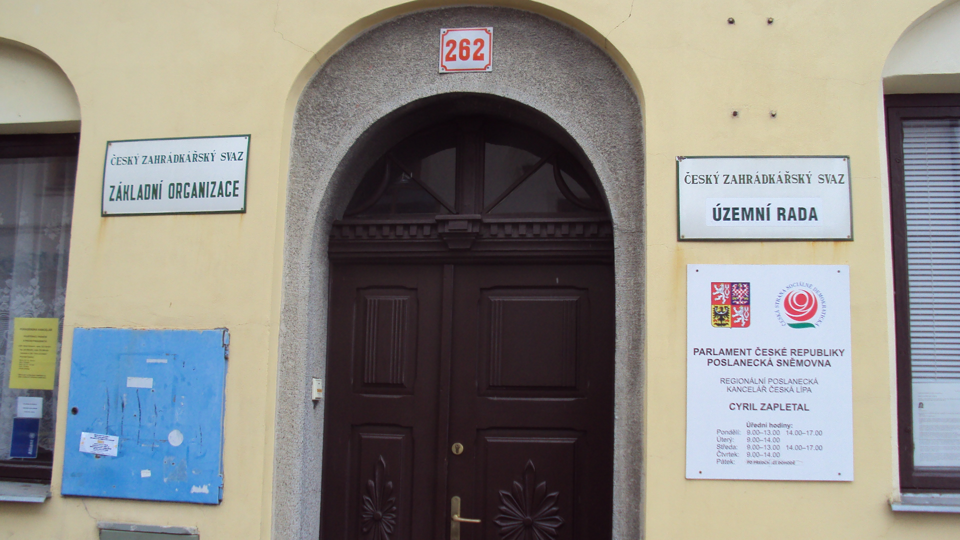 Ulice Sokolská, u středu města Česká Lípa